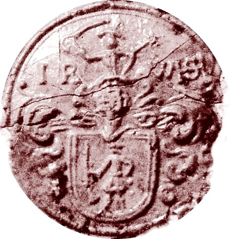 Rotwachssiegel des Rupert Wintersteller, der Familie von Maria Theresia verliehen. I R - W HS (Jesus Heiland Segenbringer / Rupert Wintersteller).